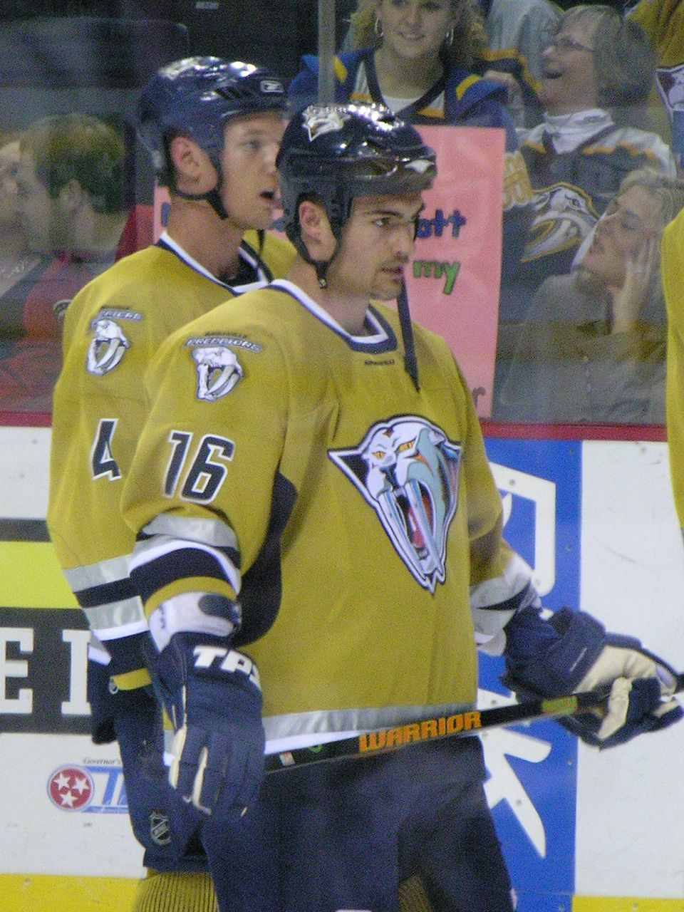 Das Bild zeigt Darcy Hordichuk von den Nashville Predators